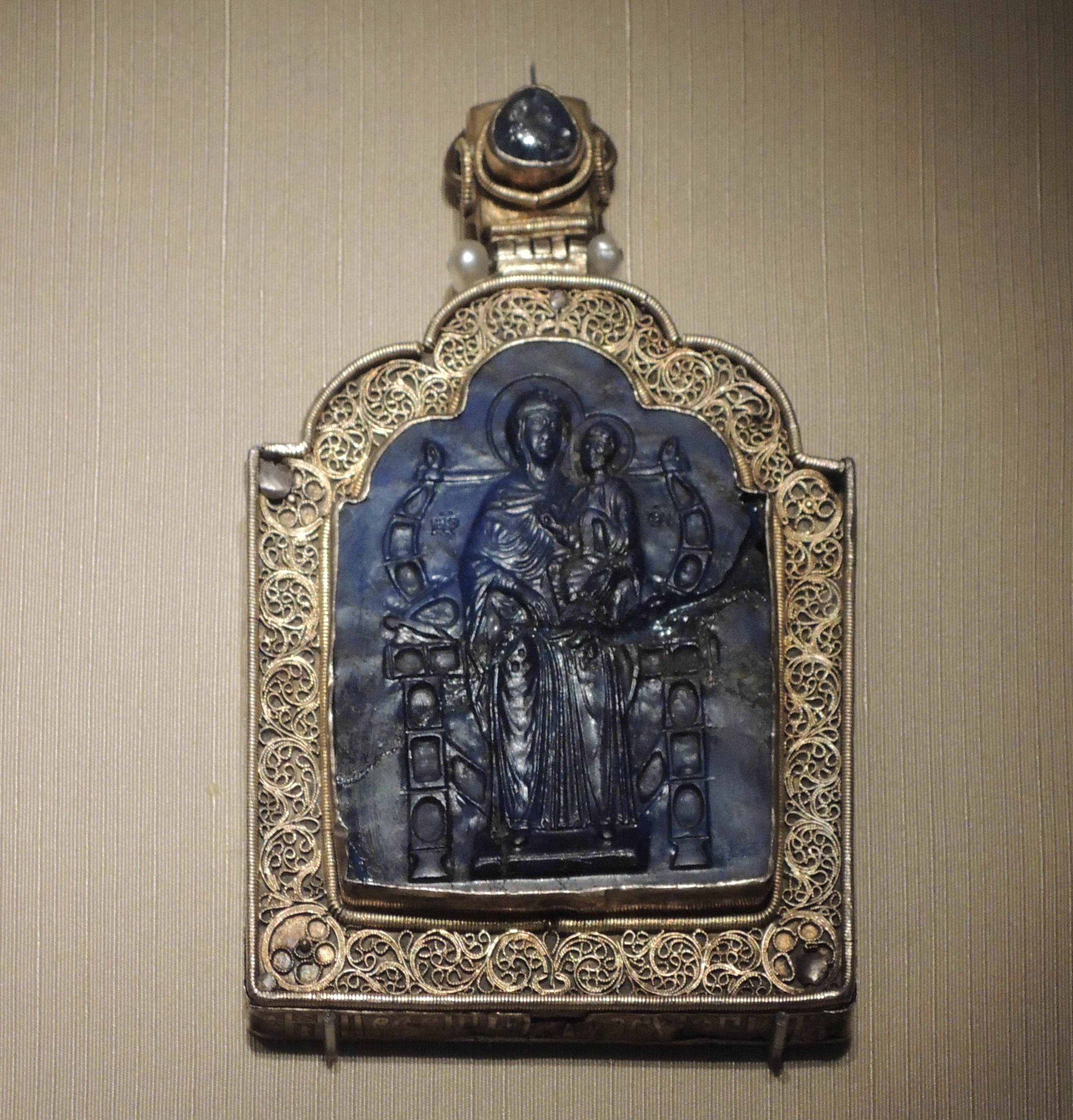 Богоматерь с младенцем на троне. Икона-мощевик наперстная. Новгород, 1434-58. Камея - Константинополь, 1-я пол. 12 века. Лазурит. ММК Сохранилось несколько драгоценных мощевиков, проиходящих из Благовещенского собора. По надписям можно предположить, что именно эти святыни привезла София Палеолог. Хранившиеся в них мощи многих святых, очевидно, были привезены из Рима.